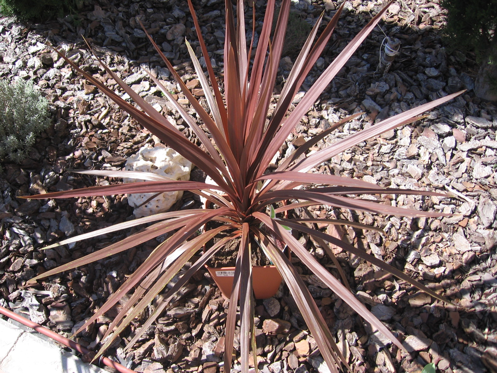 Cordyline australis 'Red Star' A vigorous cultivar with very dark reddish bronze sword-like leaves.